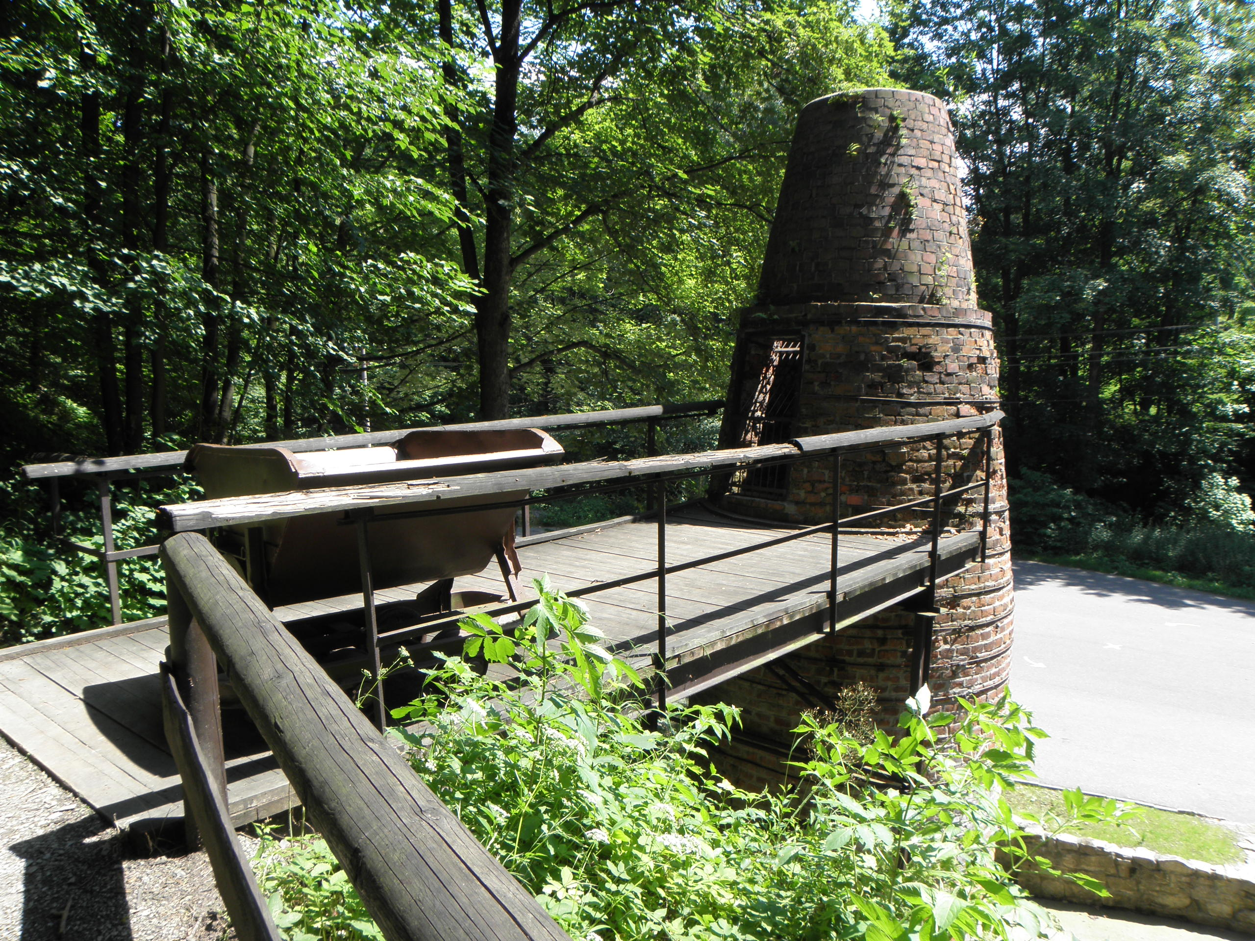 Vápenky ve Vendryni - mladší cihlová pec; Vendryně (CZ)